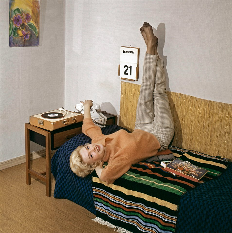 Vieno Kekkonen boxissaan 1960